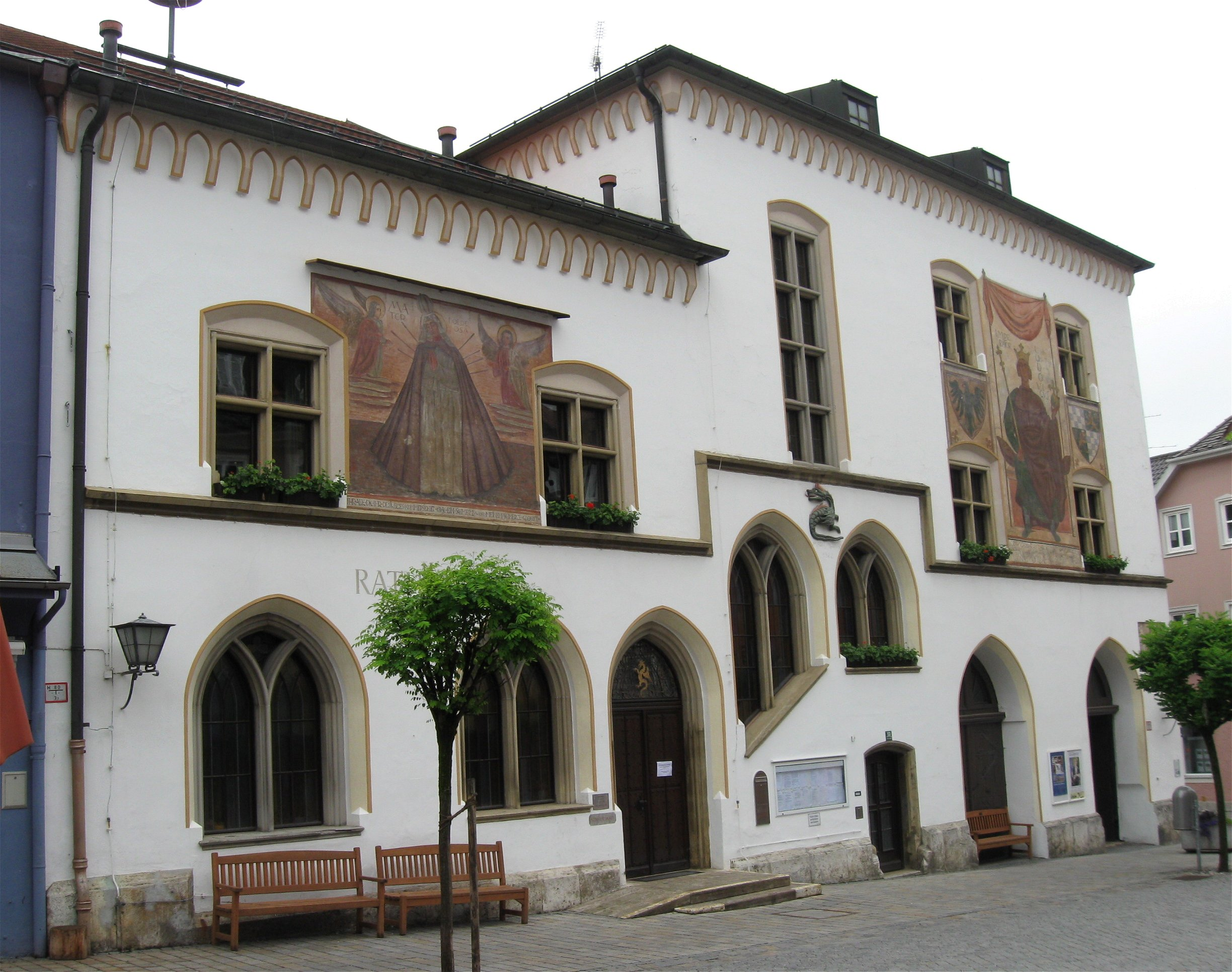 Untermarkt 13; Rathaus, dreigeschossiger gotisierender Walmdachbau mit nördlich zweigeschossigem Flachsatteldachanbau, Maßwerkfenstern und Fassadenmalerei, 1842.